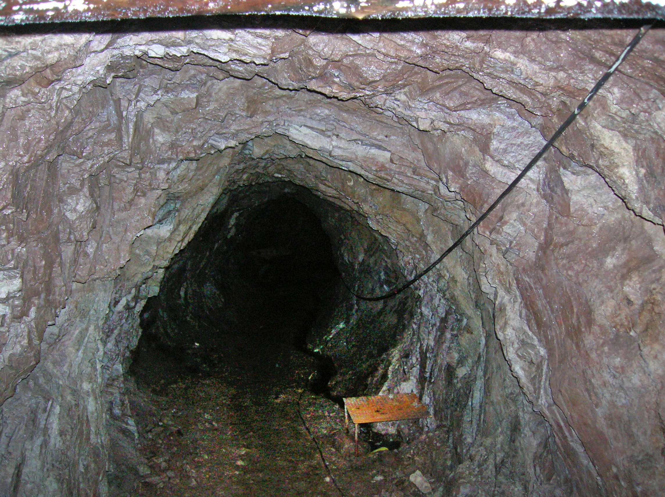 Sztolnia w Kletnie